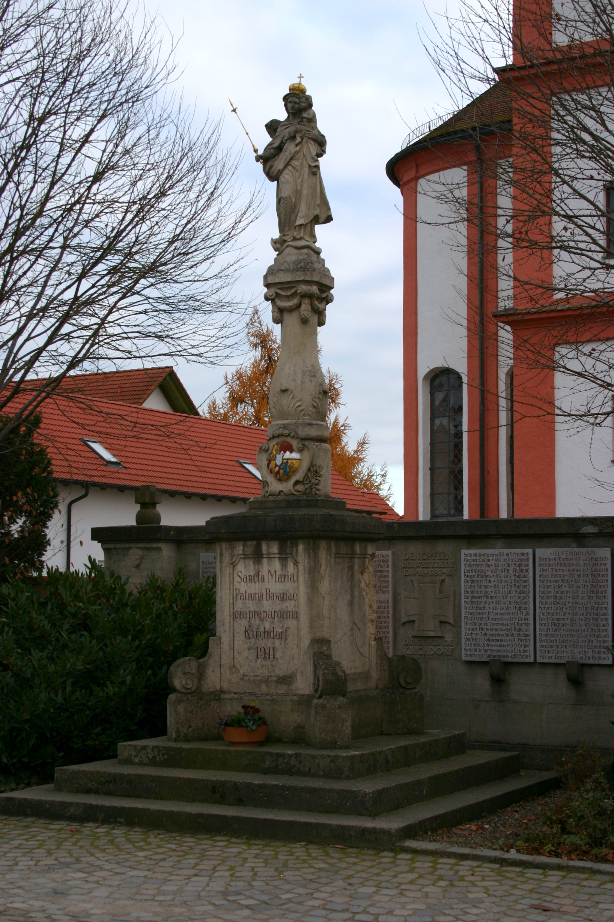 Sandsteinfigur auf Säule